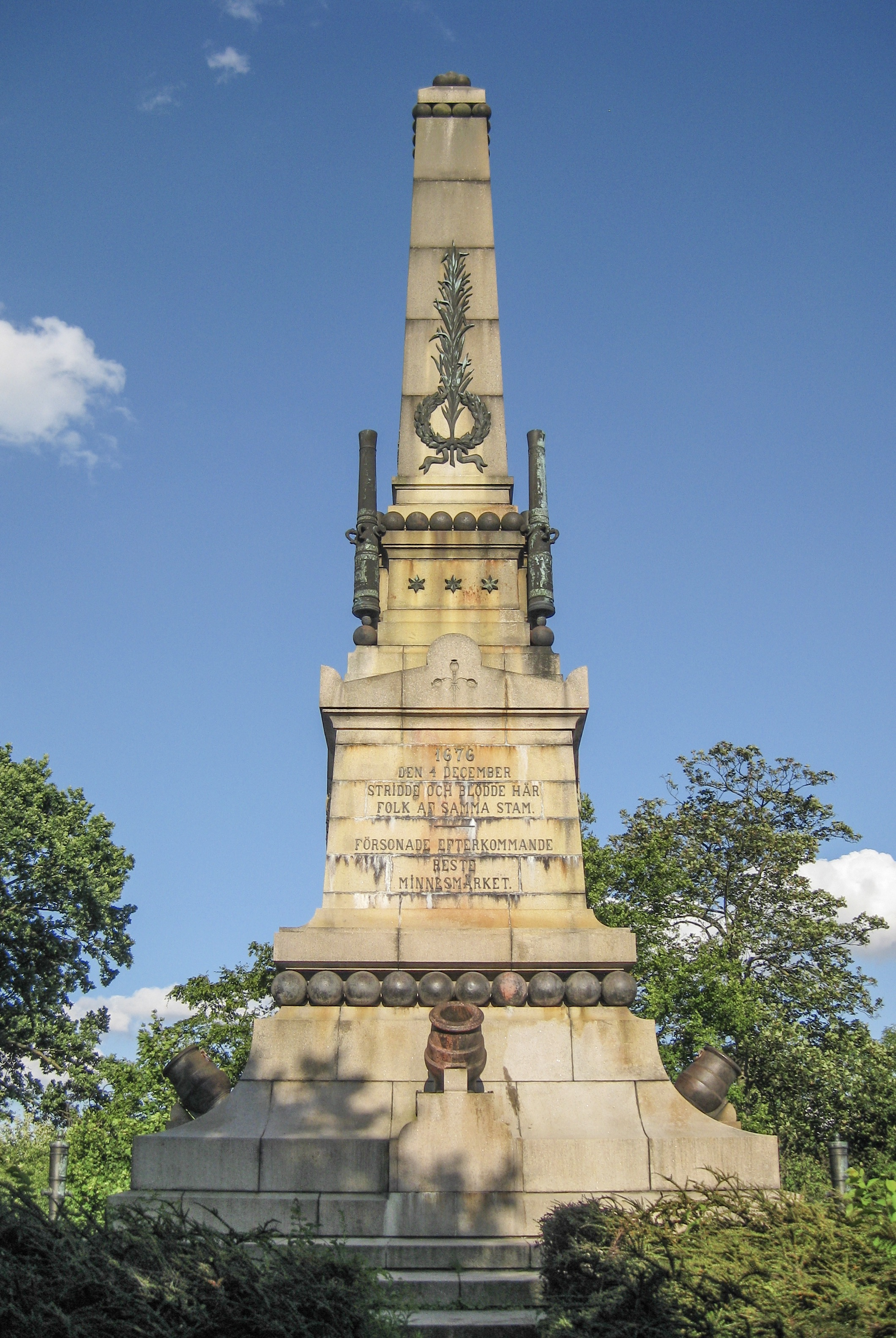 Monumentet i Lund, 2014